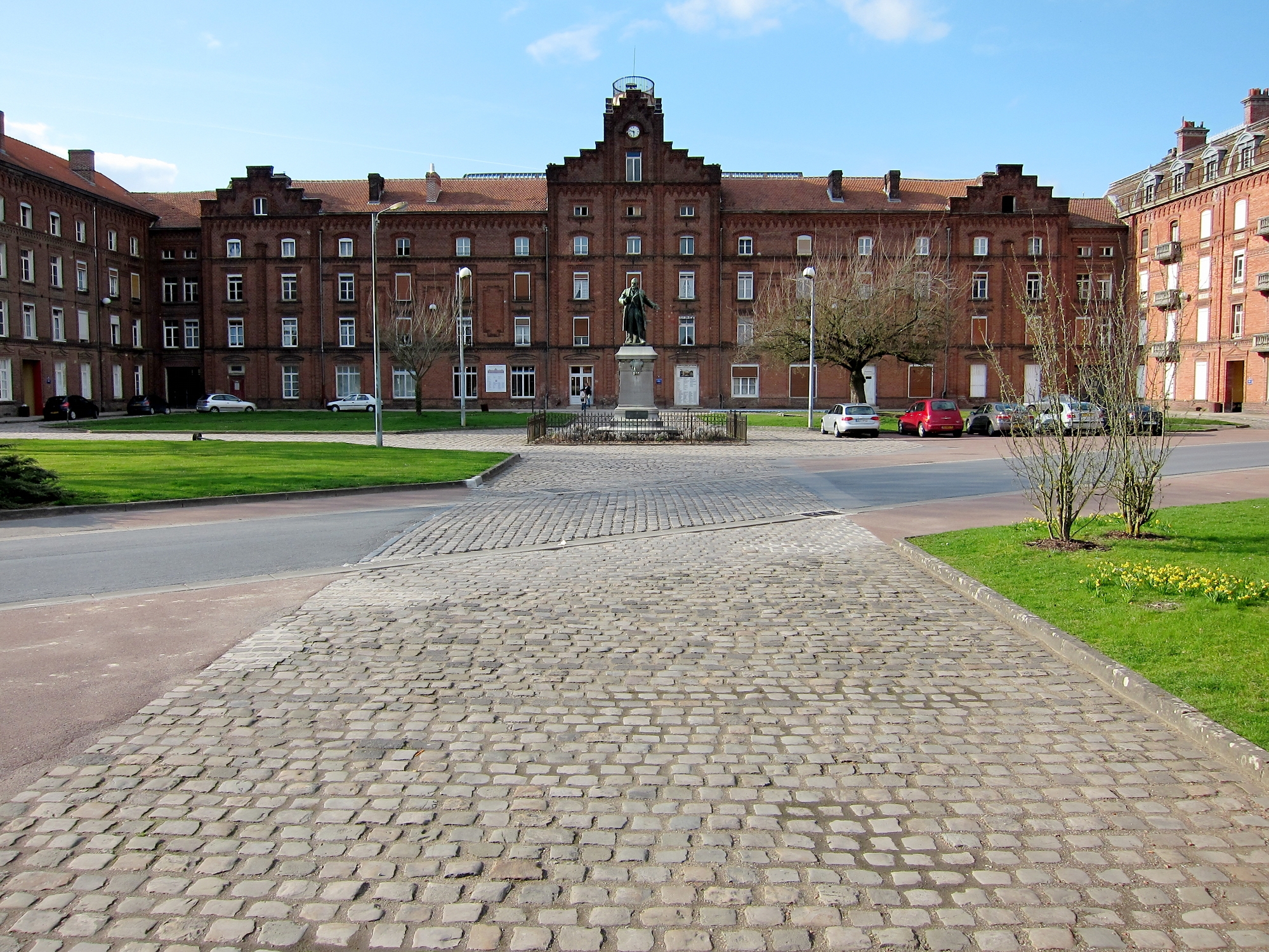 Le pavillon central du palais social du familistère de Guise (Aisne).